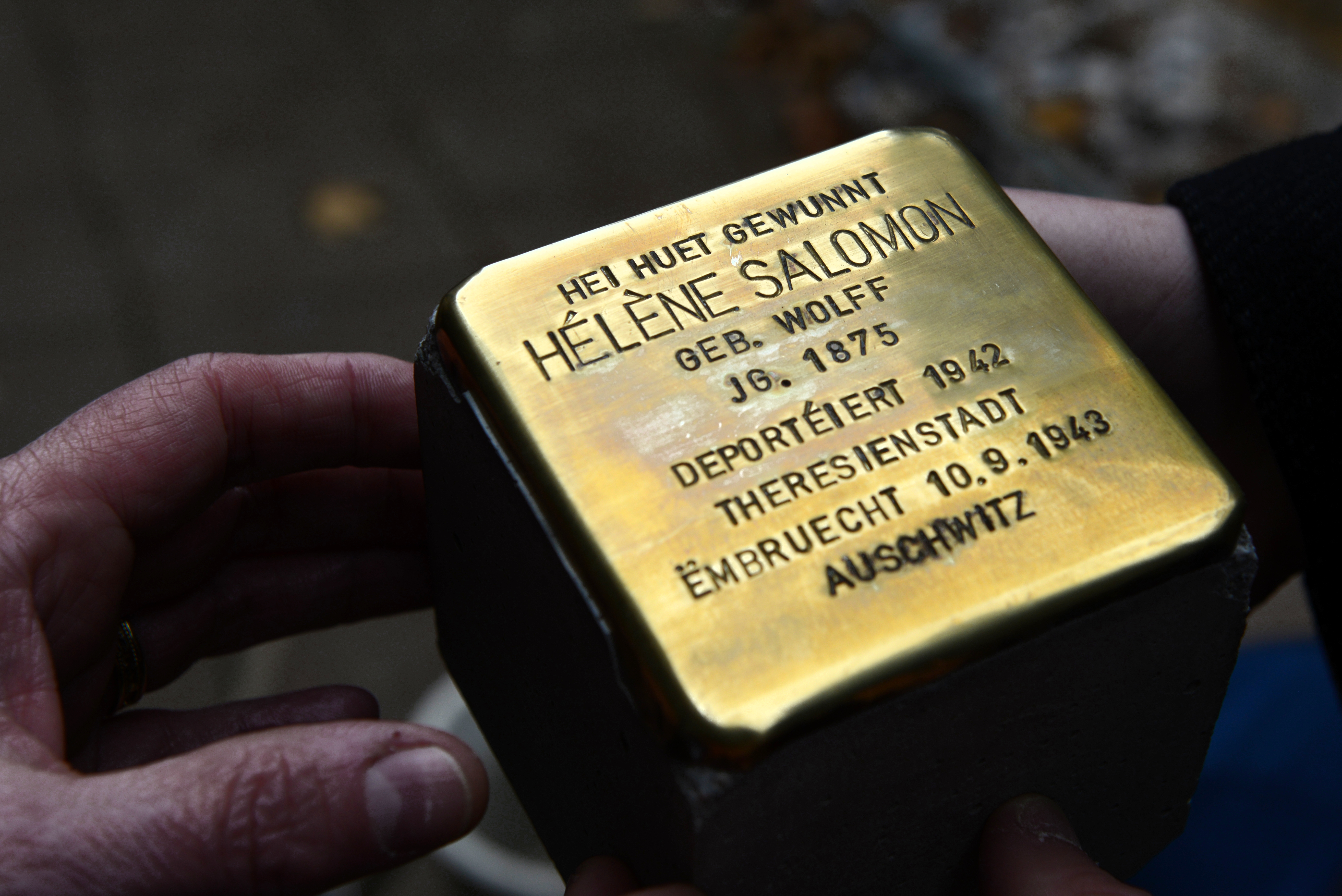 Den 28. Oktober 2014 goufen zu Déifferdeng am Kader vun der Ausstellung «Quand Differdange devint "judenrein". Le jour où nos chemins se séparèrent» déi éischt Stolpersteng geluecht.D'Hélène Salomon huet bis den 28. Juli 1942 op Nummer 25, rue Michel-Rodange zu Déifferdeng gewunnt. Du gouf déi 67 Joer al Fra op Terezín (Theresienstadt) an d'Konzentratiounslager deportéiert, wou si ënner schreckleche Konditiounen iwwer ee Joer iwwerlieft huet. Schliisslech gouf si am September 1943 op Auschwitz transferéiert an do vergaast.